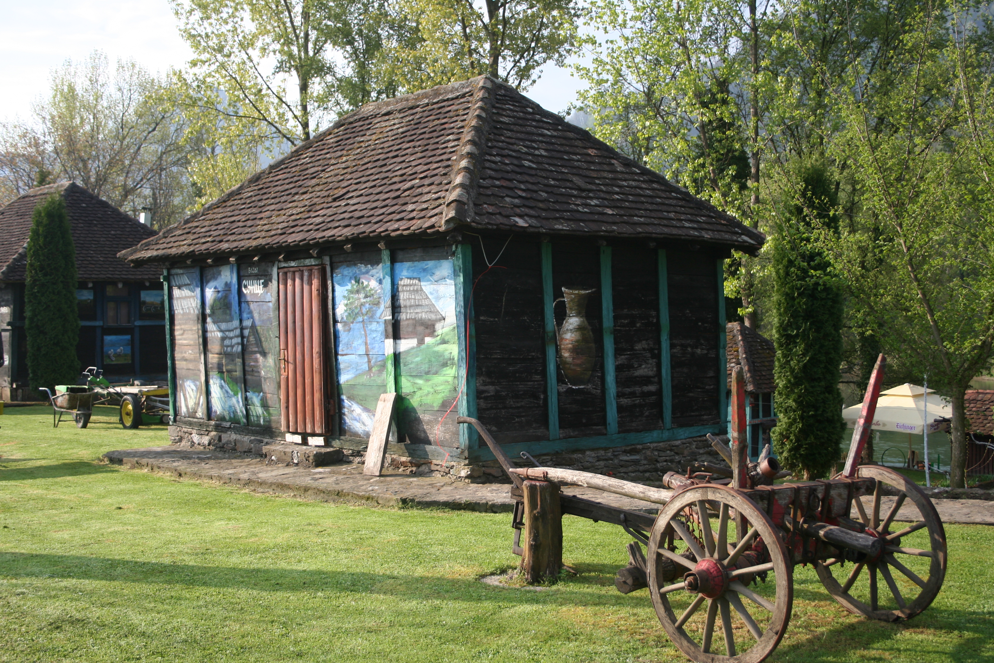 Etno selo Vrhpolje